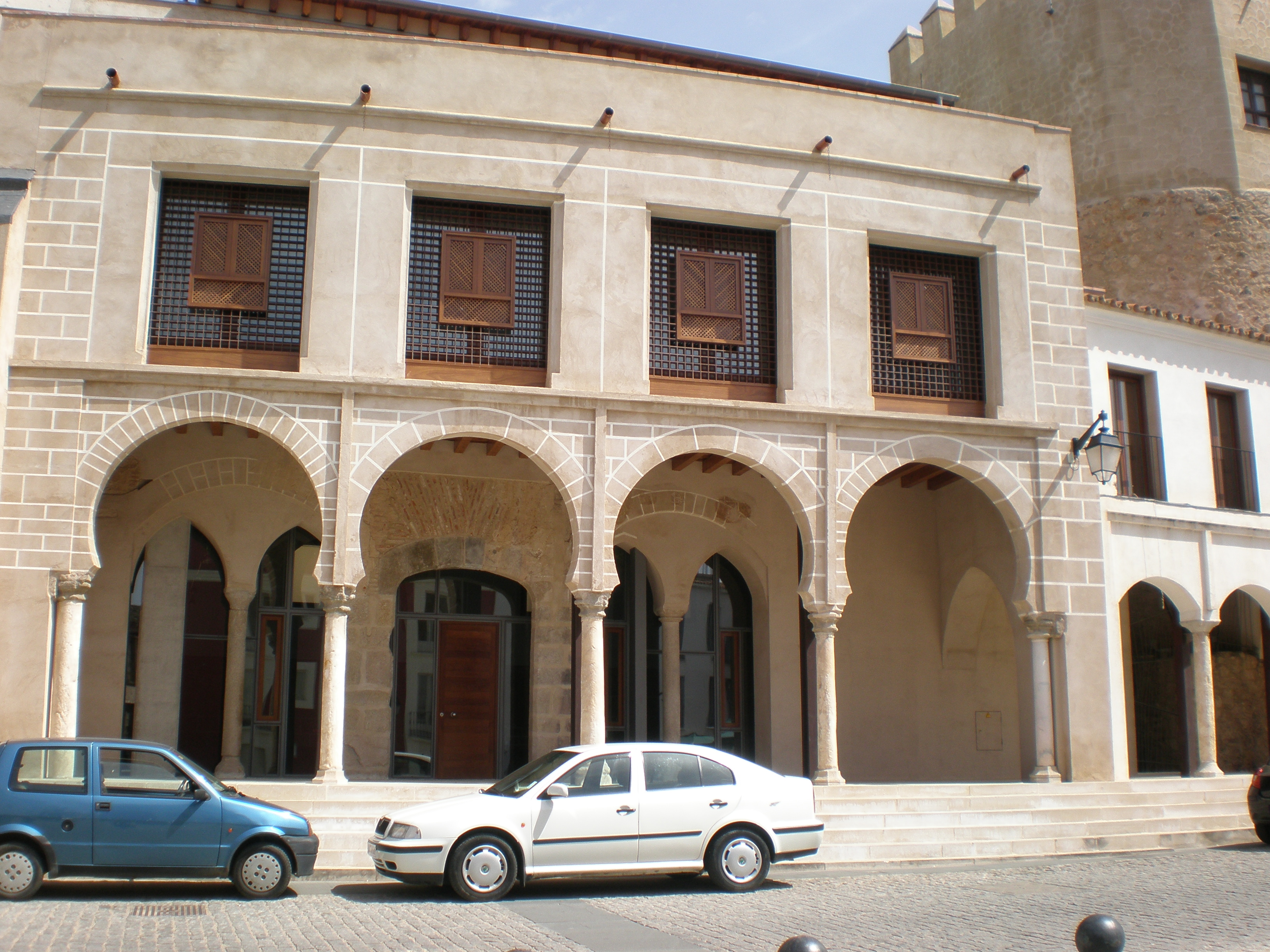 Plaza Alta, Antigua casa consistorial, Badajoz, Extremadura, Spain